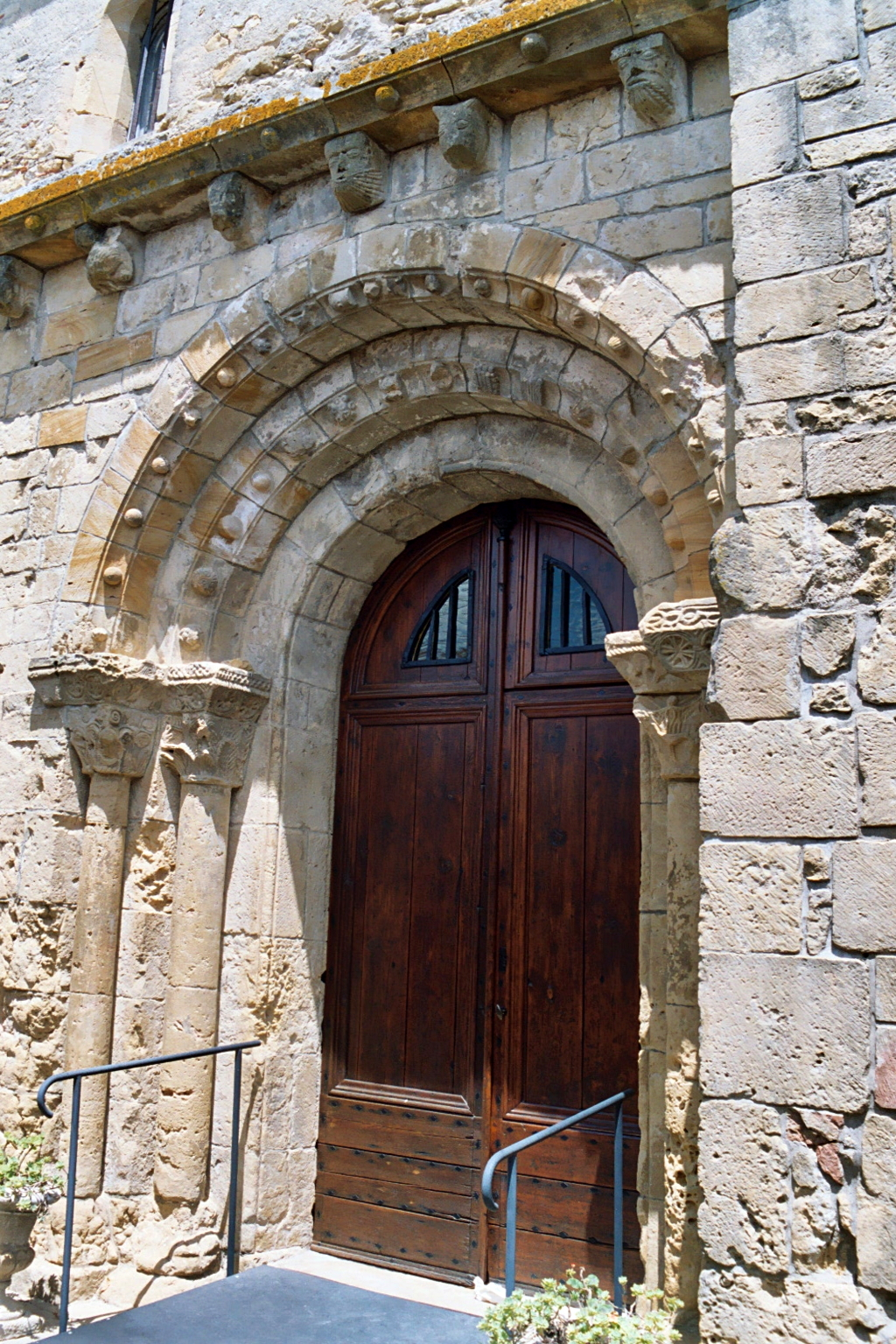 France - Languedoc - Aude - Église de Payra-sur-l'Hers